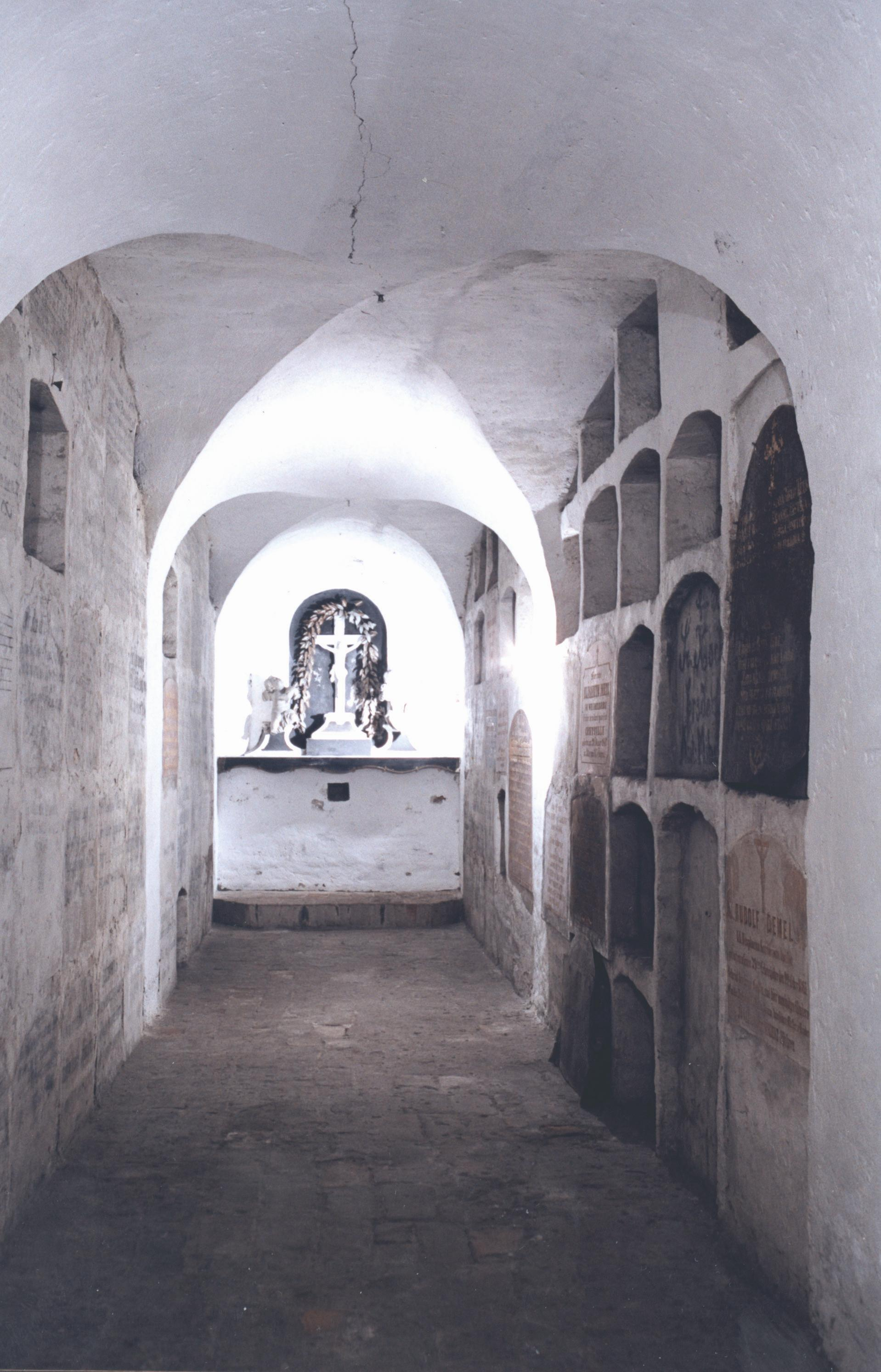 Prolaz u Kriptu ispod crkve sv. Jurja u Petrovaradinu